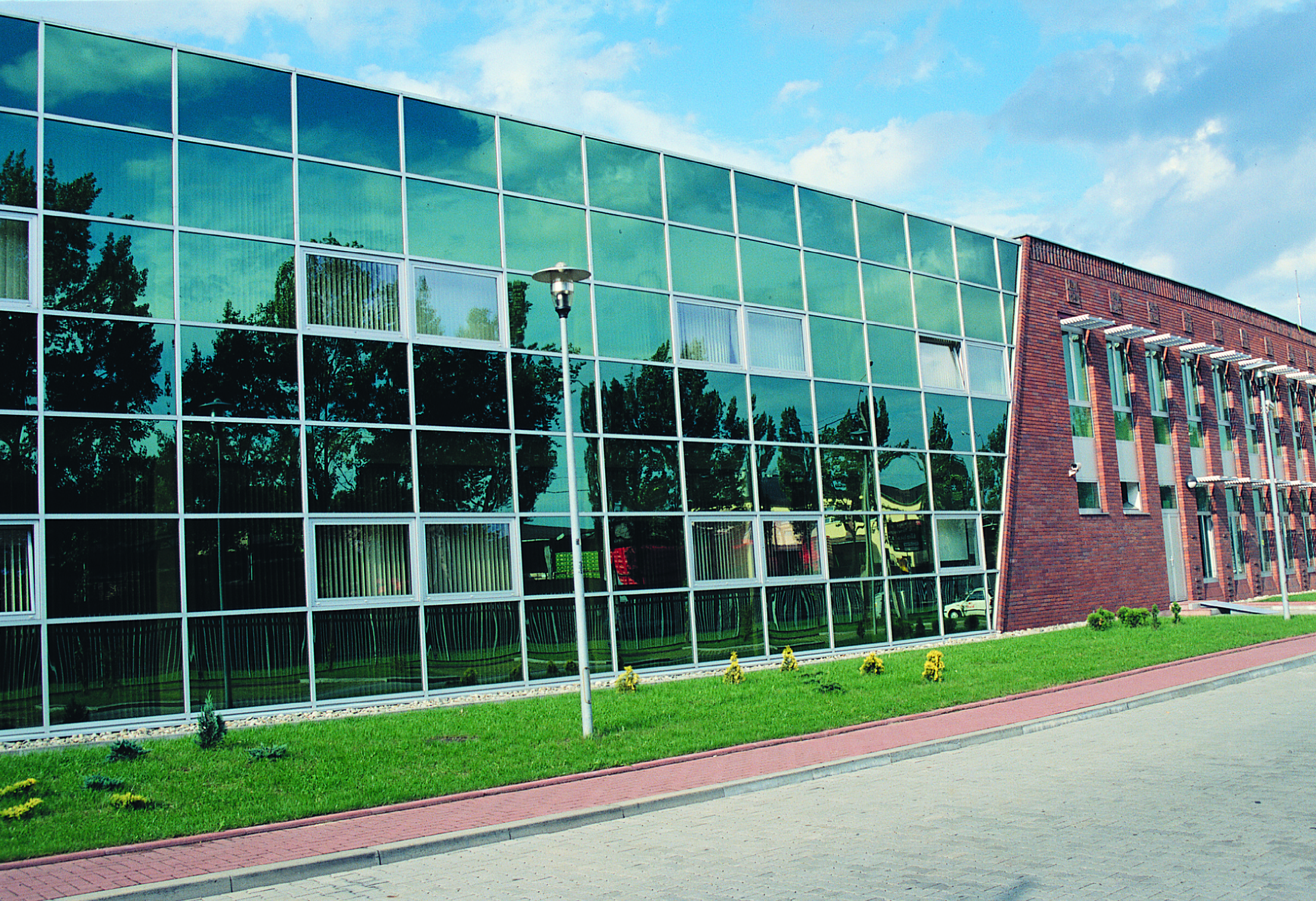 Browar Książęcy - nowa część - Tychy fot. tyski art. fotograf